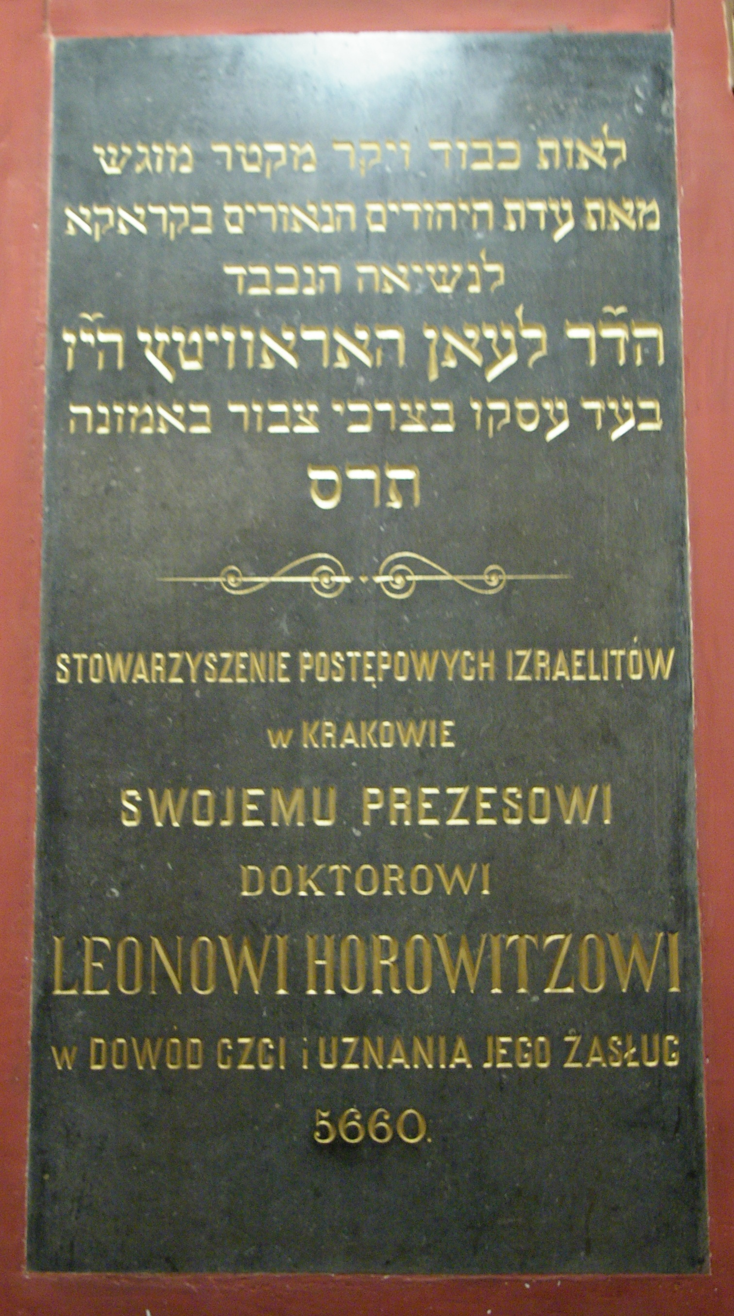 Tablica pamiątkowa w Synagodze Tempel w Krakowie